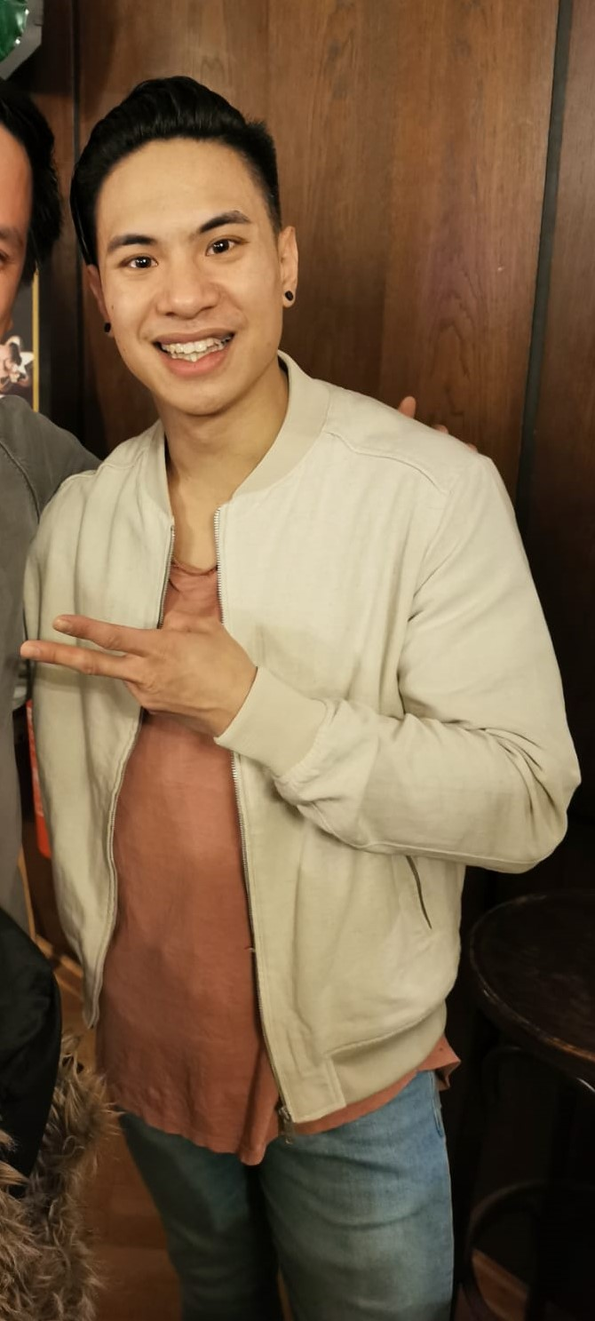 Tutty Tran Autogrammstunde mit Fans nach seinem Auftritt am 30.11.19 in Hannover